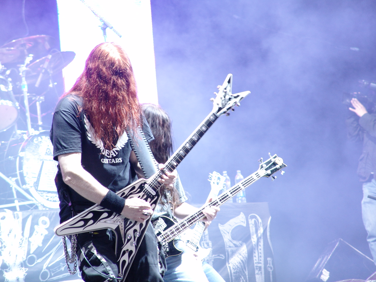 Carcass en rock al parque